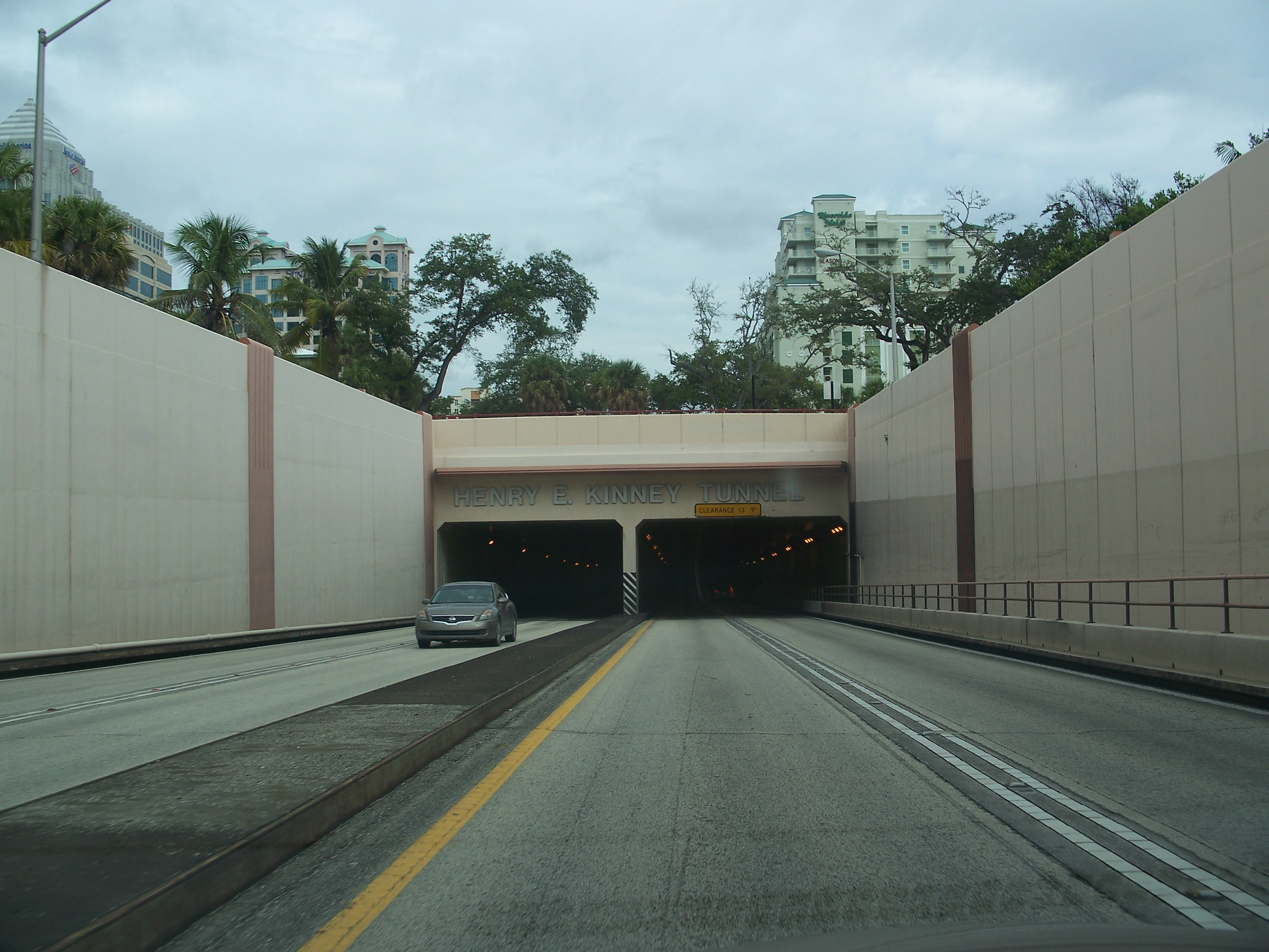 Fort Lauderdale, Florida: New River Tunnel, looking north